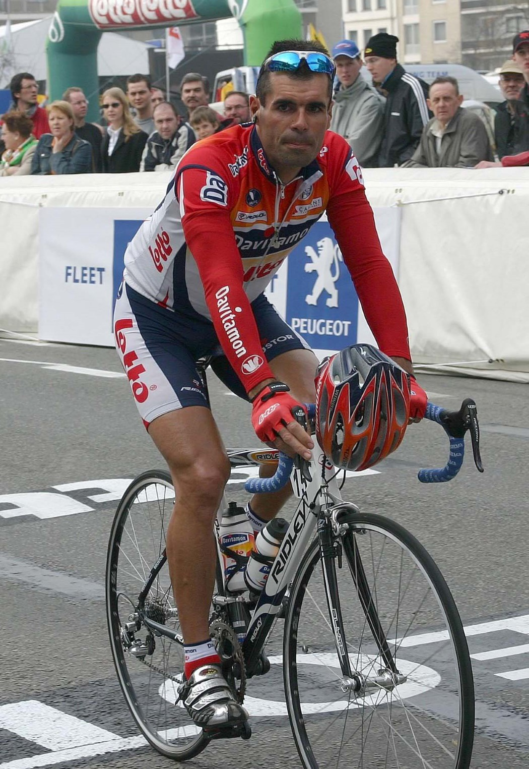 van peteghem